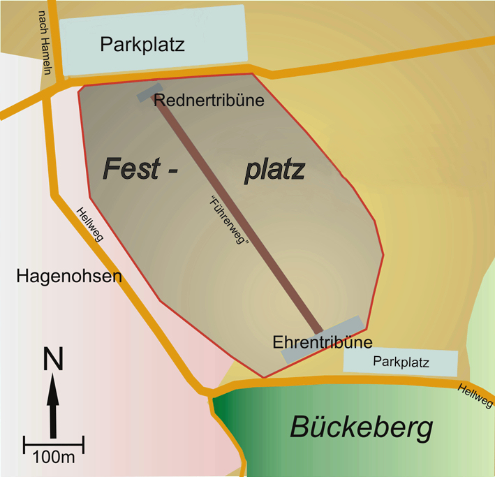 Grafische Darstellung des Reichserntedank-Festplatzes bei Hagenohsen an der Weser 1933